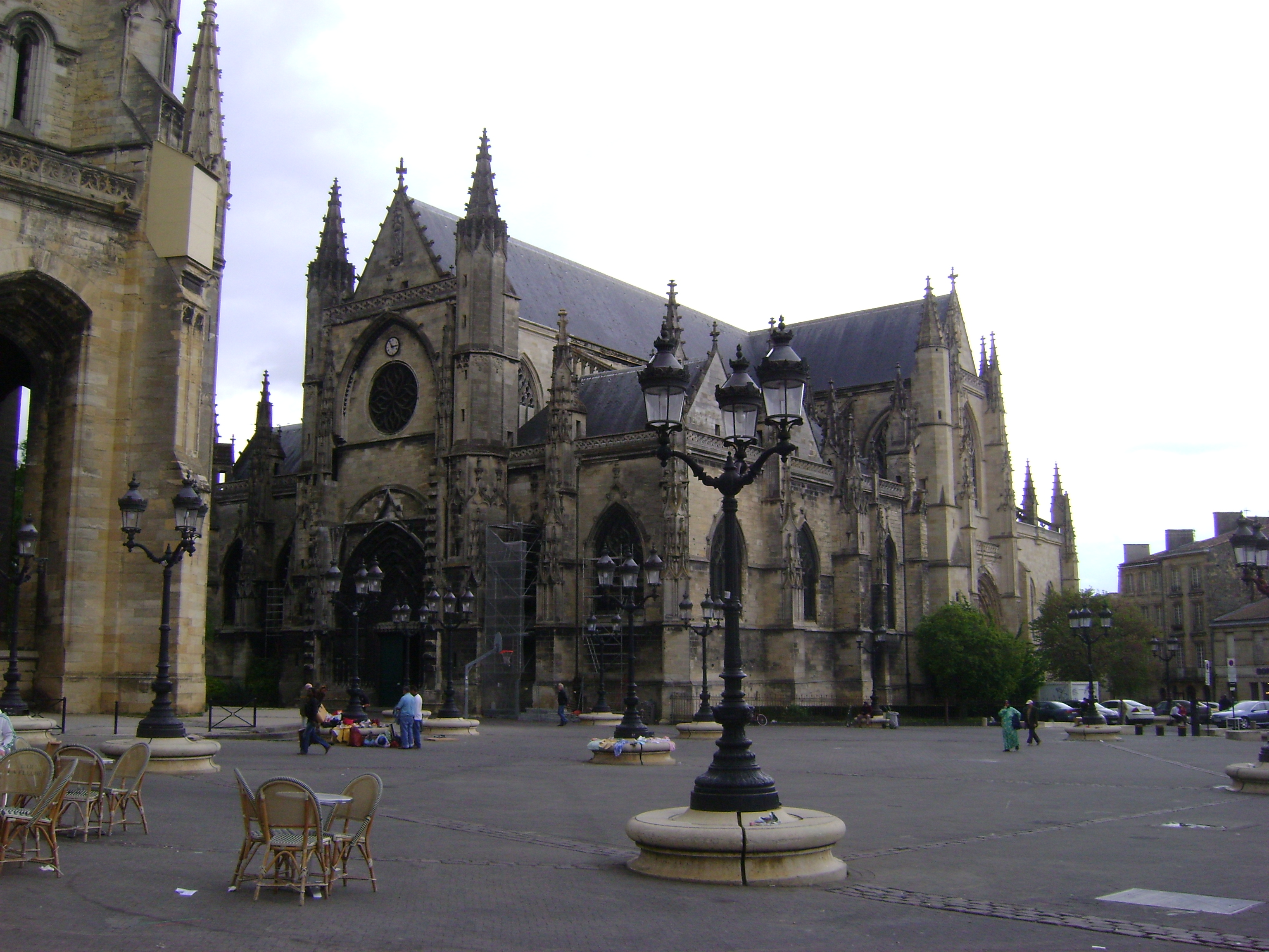 Basilique Saint-Michel de Bordeaux. .